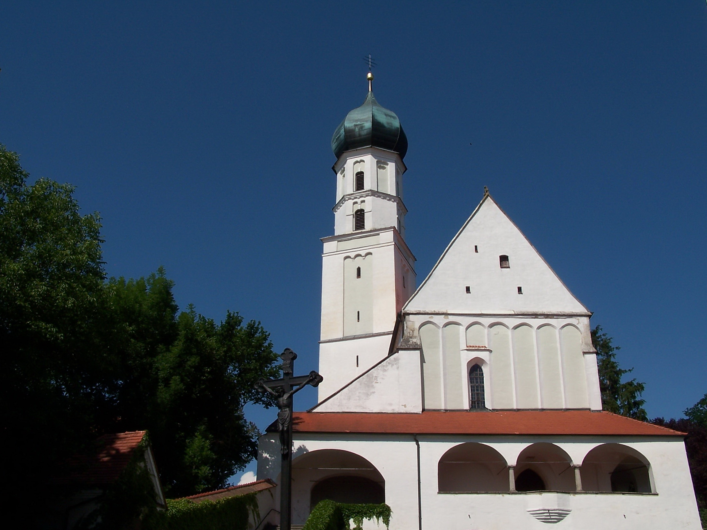 Haindling Kirche Heilig Kreuz. Bedeutung als Kriegergedächtniskirche.